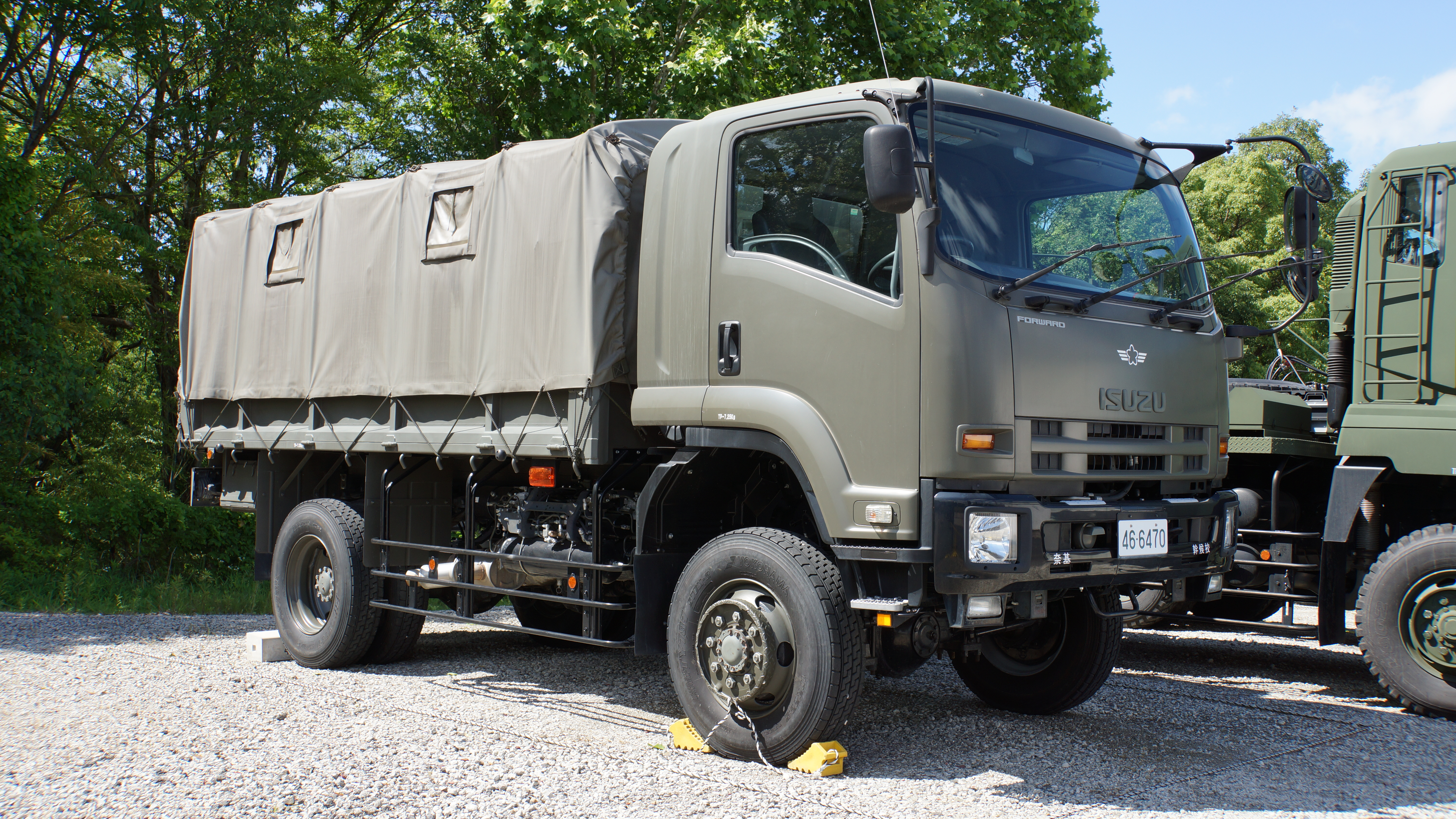 航空自衛隊 トラック2 1/2t 4×4カーゴ（いすゞ・フォワード）。 15年6月6日 奈良基地にて。